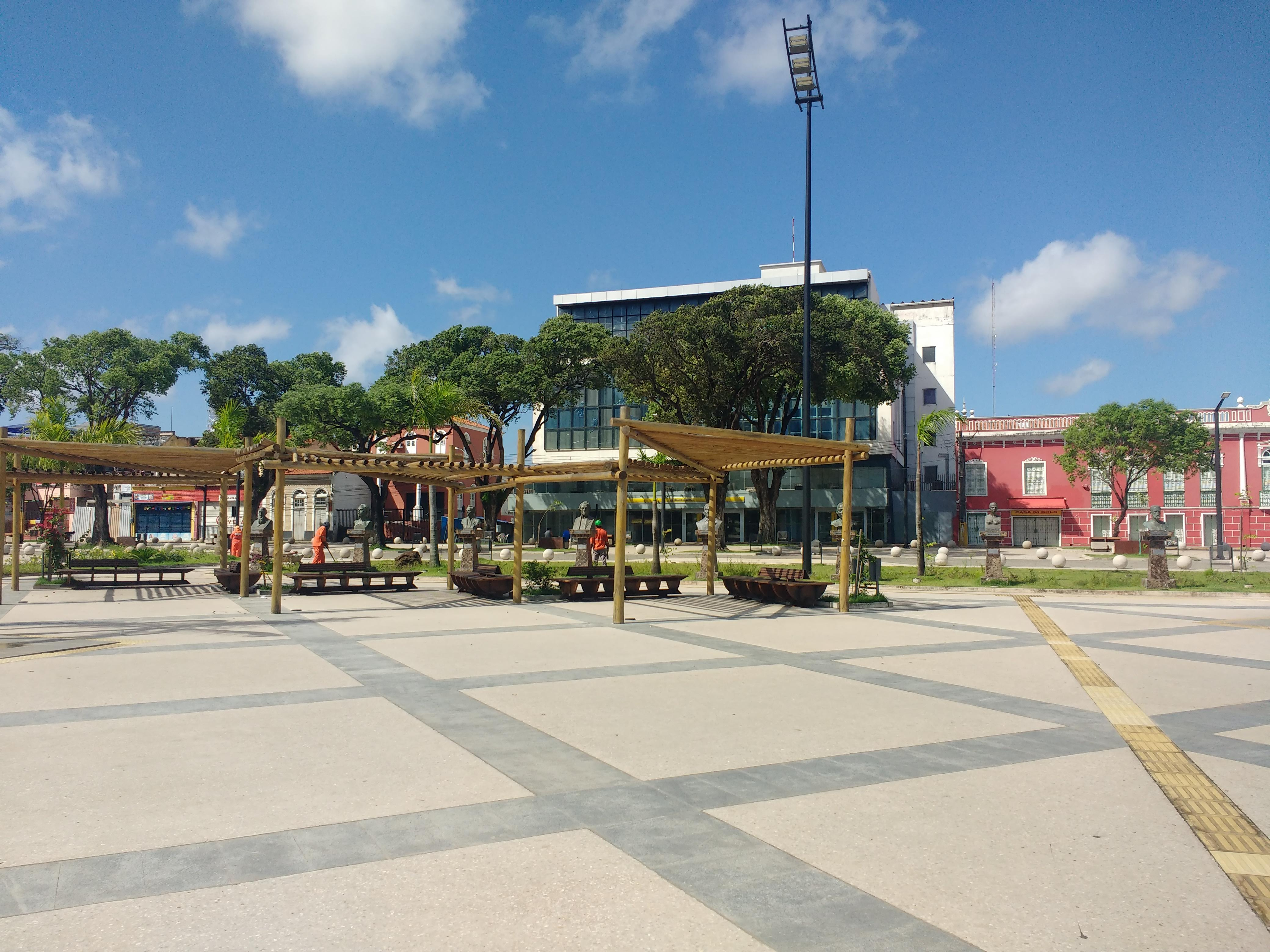 Bustos da Praça do Pantheon, localizada em São Luís (MA)